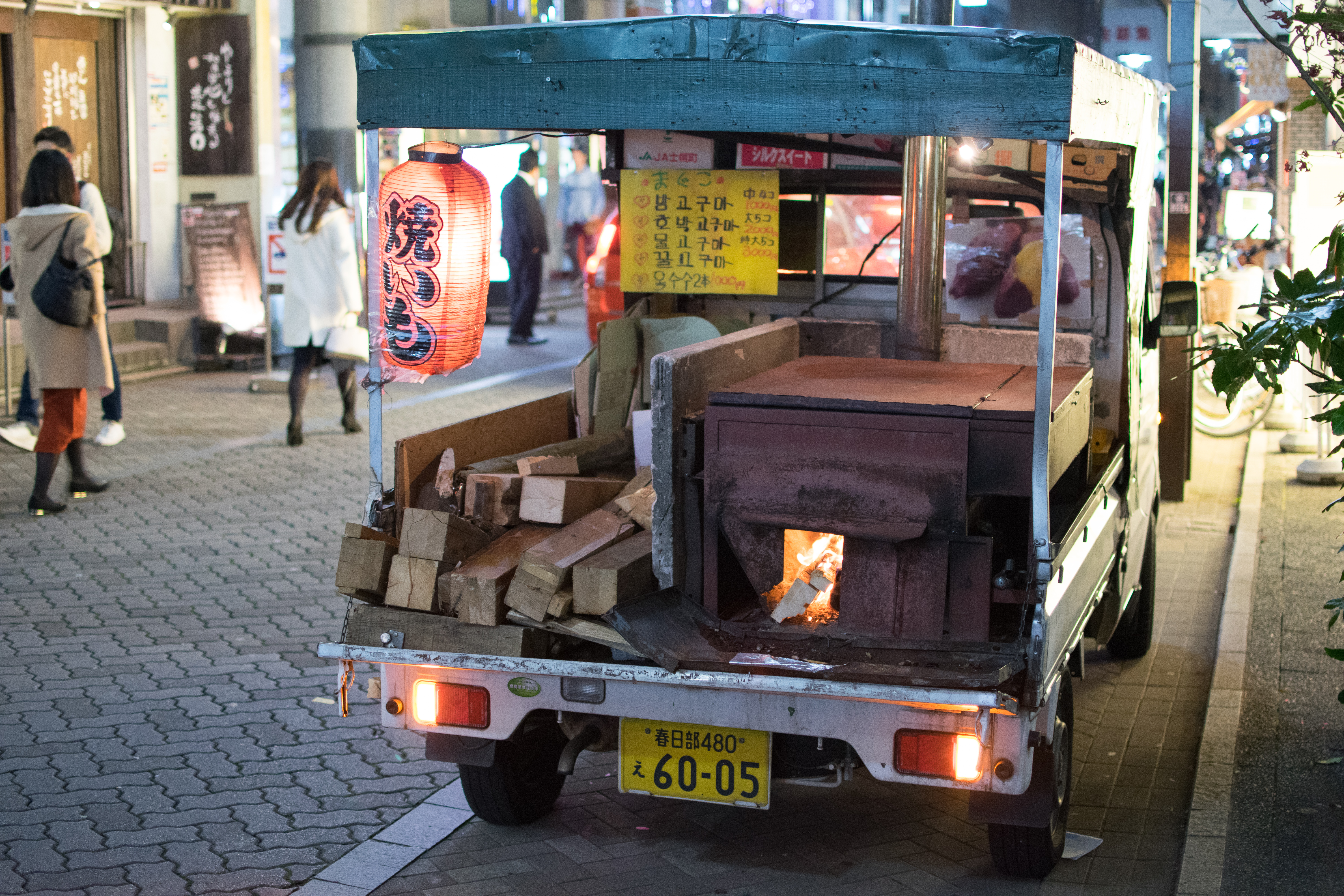 Tokyo